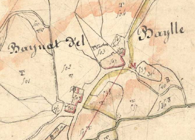 El Veïnat del Batlle, de Casafabre, en el Cadastre napoleònic del 1812 (Arxius Departamentals dels Pirineus Orientals)